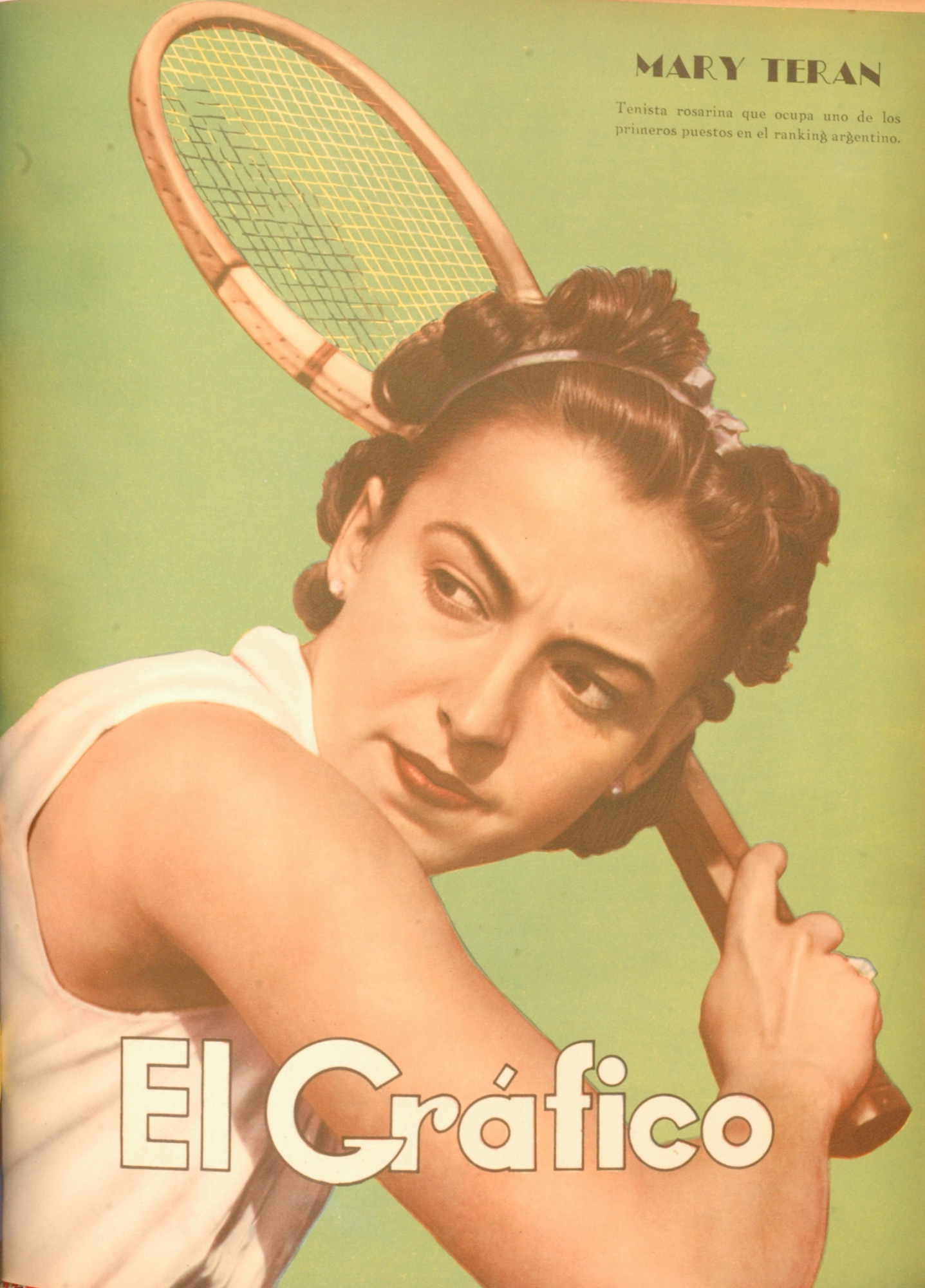 El Grafico del 02 de Junio de 1939. Edicion 1038